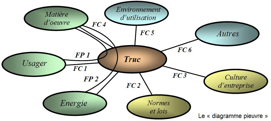 schéma réalisé sous Word